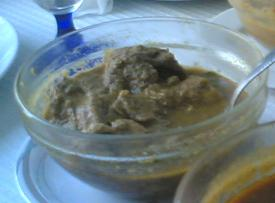 Chacuti, um prato de Goa. Chacuti, a dish from Goa.